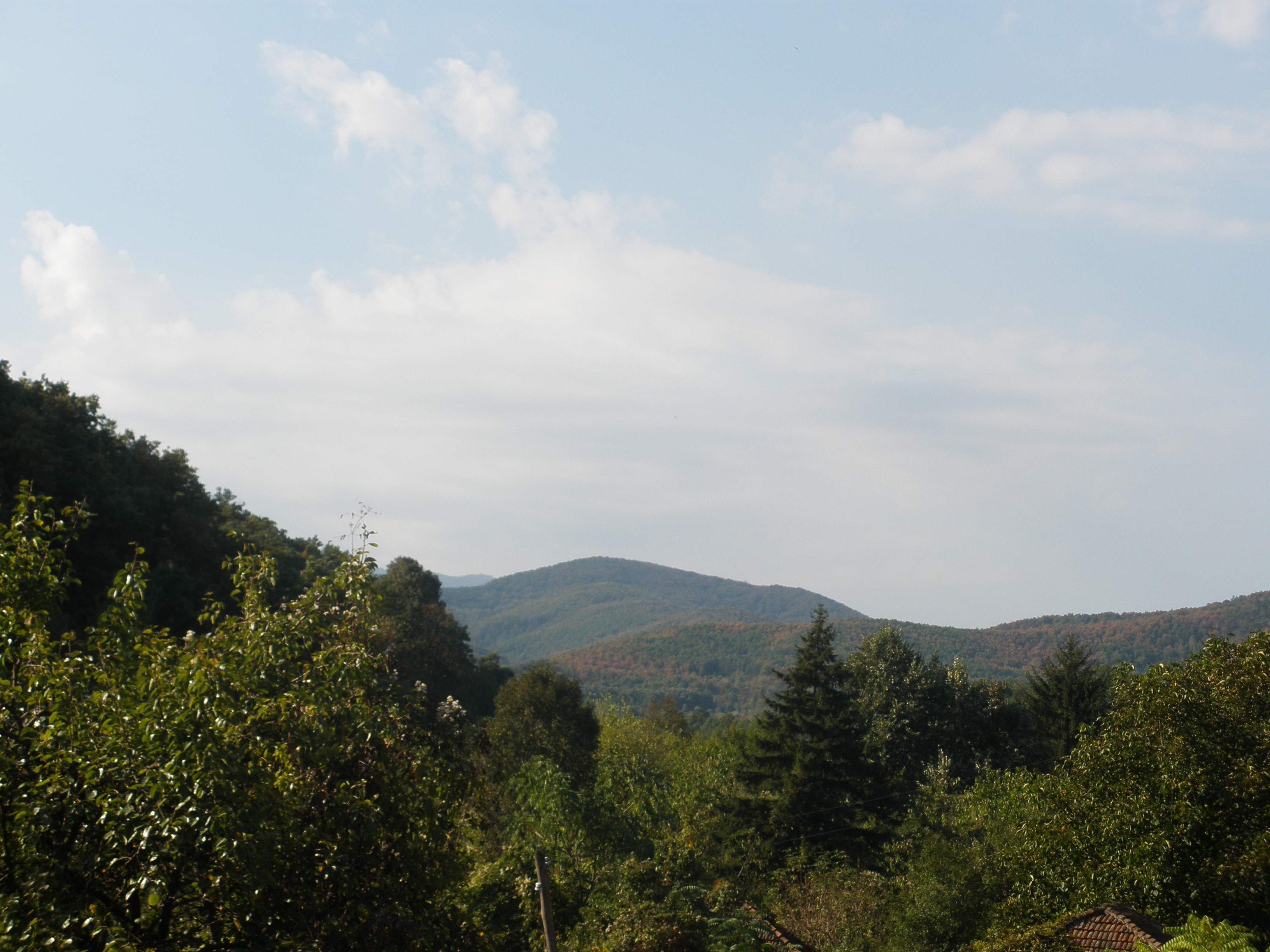 Село Ошане